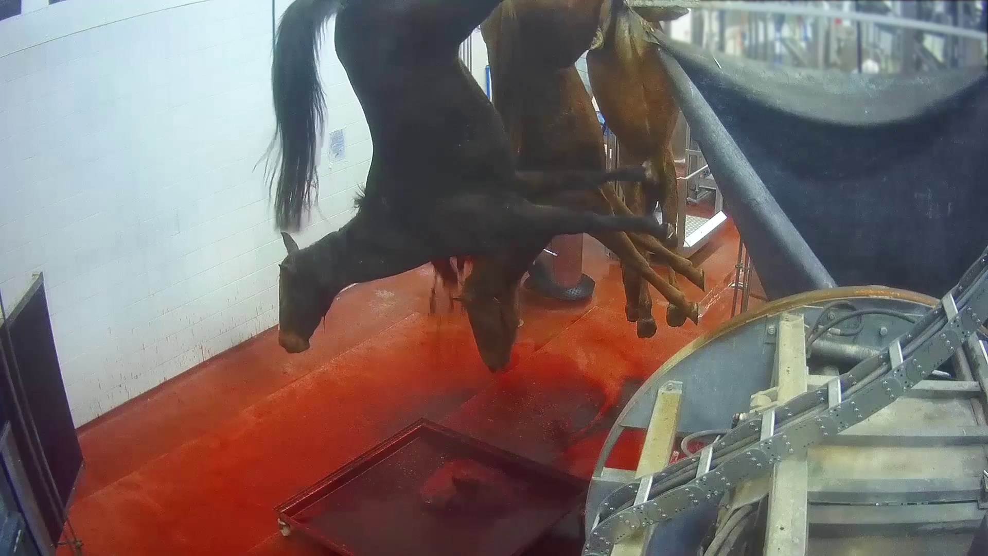 Abattoir d'Equevillon (enquête L214 décembre 2018)